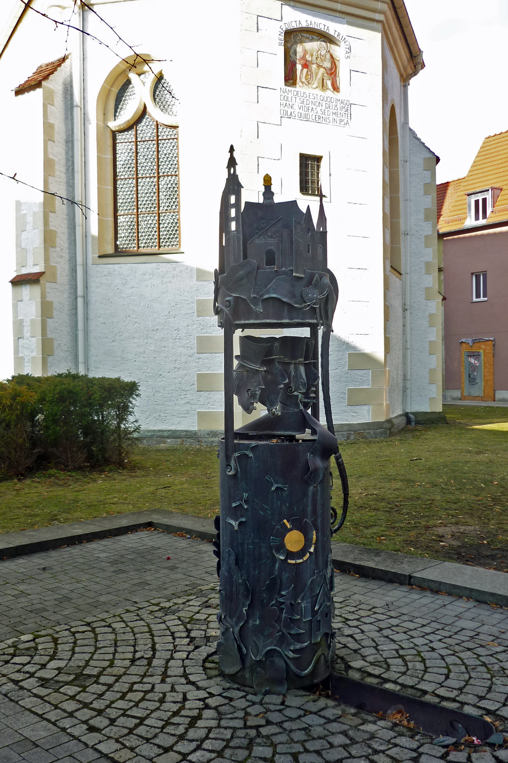 Sängerdenkmal (Pumpe) in Finsterwalde hinter der Trinitatiskirche